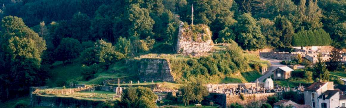 vue du château de Fontenoy